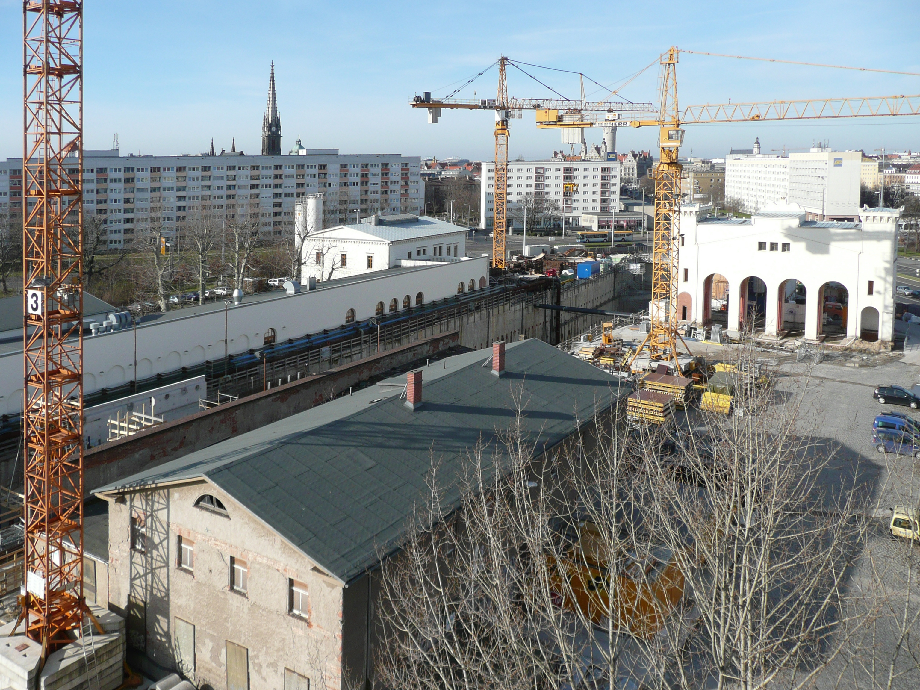 Der Bayerische Bahnhof in Leipzig mit City Tunnel Baustelle